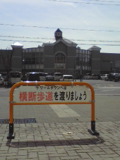 ヨーカドー構内にある注意書きとALi